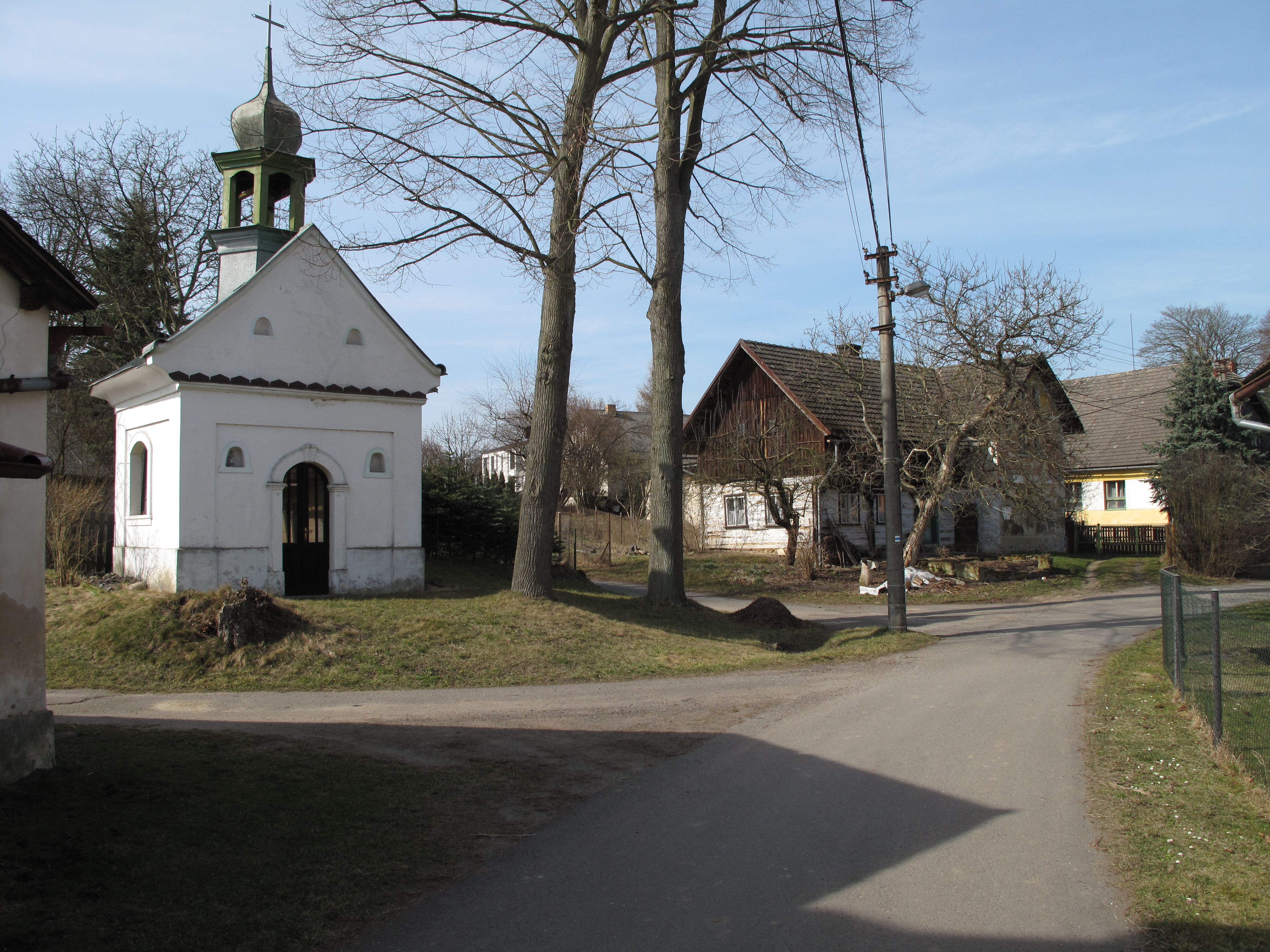 Kaple sv. Linharta v Hrubém Lesnově. Okres Liberec, Česká republika.